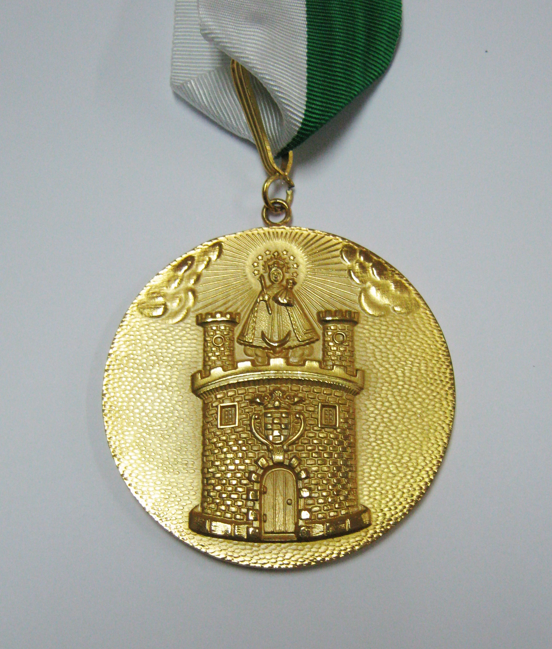 Condecoración "Medalla Alcaldía de Medellín", Categoría Oro, dada a la Biblioteca Pública Piloto de Medellín por medio del Decreto 1678 de 4 de diciembre de 2003. Medellín. Colombia.